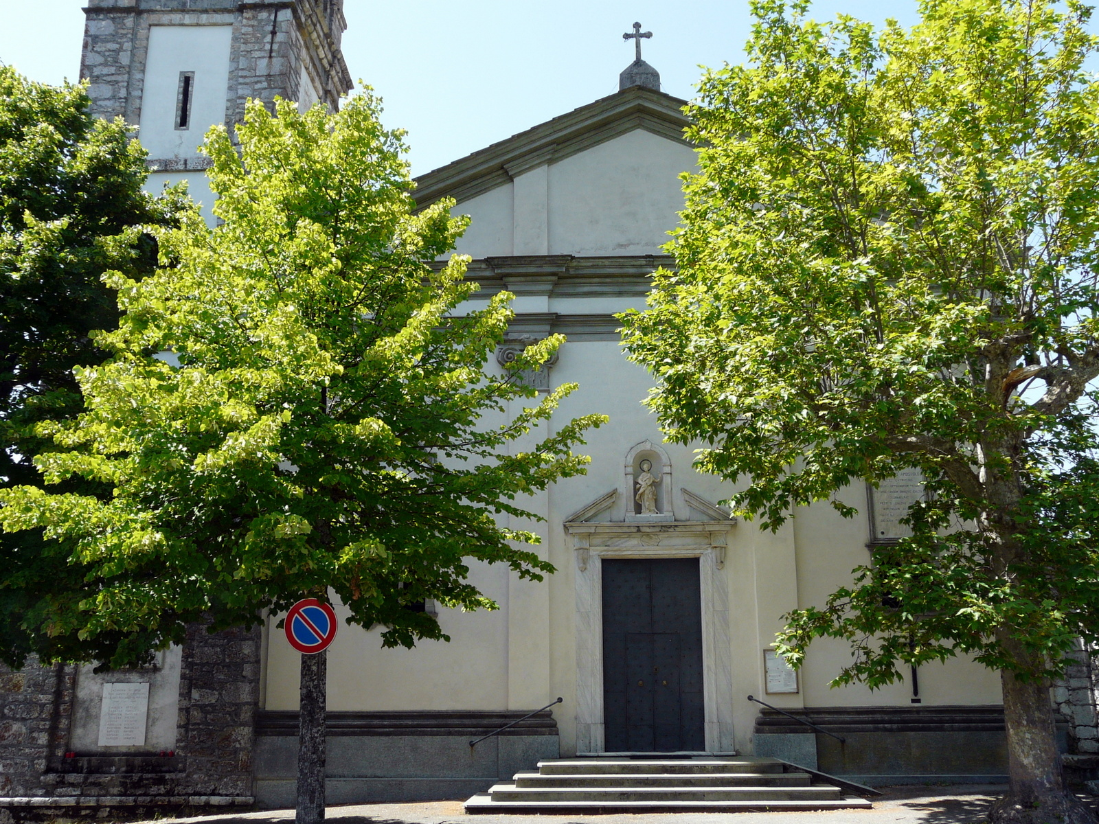 La chiesa di San Pietro apostolo, Casanova, Rovegno, Liguria, Italia